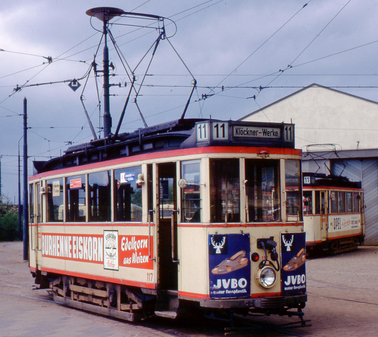 Straßenbahn Bremen, Wagen Nr. 117 am Sonntag, den 18. Mai 1963 im Depot Gröpelingen